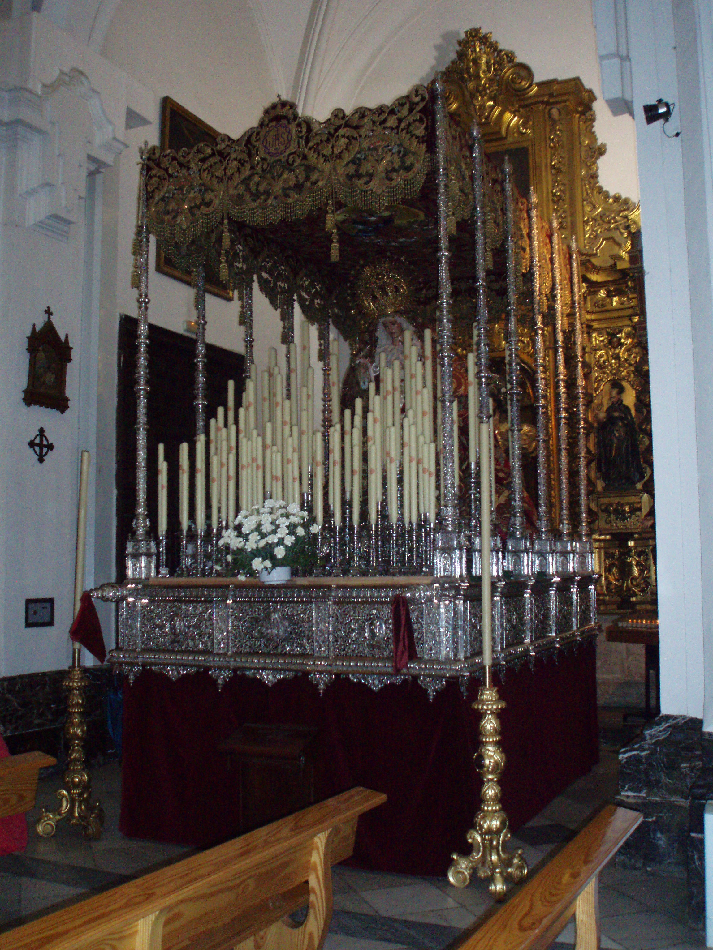 Paso de palio de Nuestra Señora Reina de los Mártires en la iglesia de San Hipólito de Córdoba, provincia de Córdoba, (España).